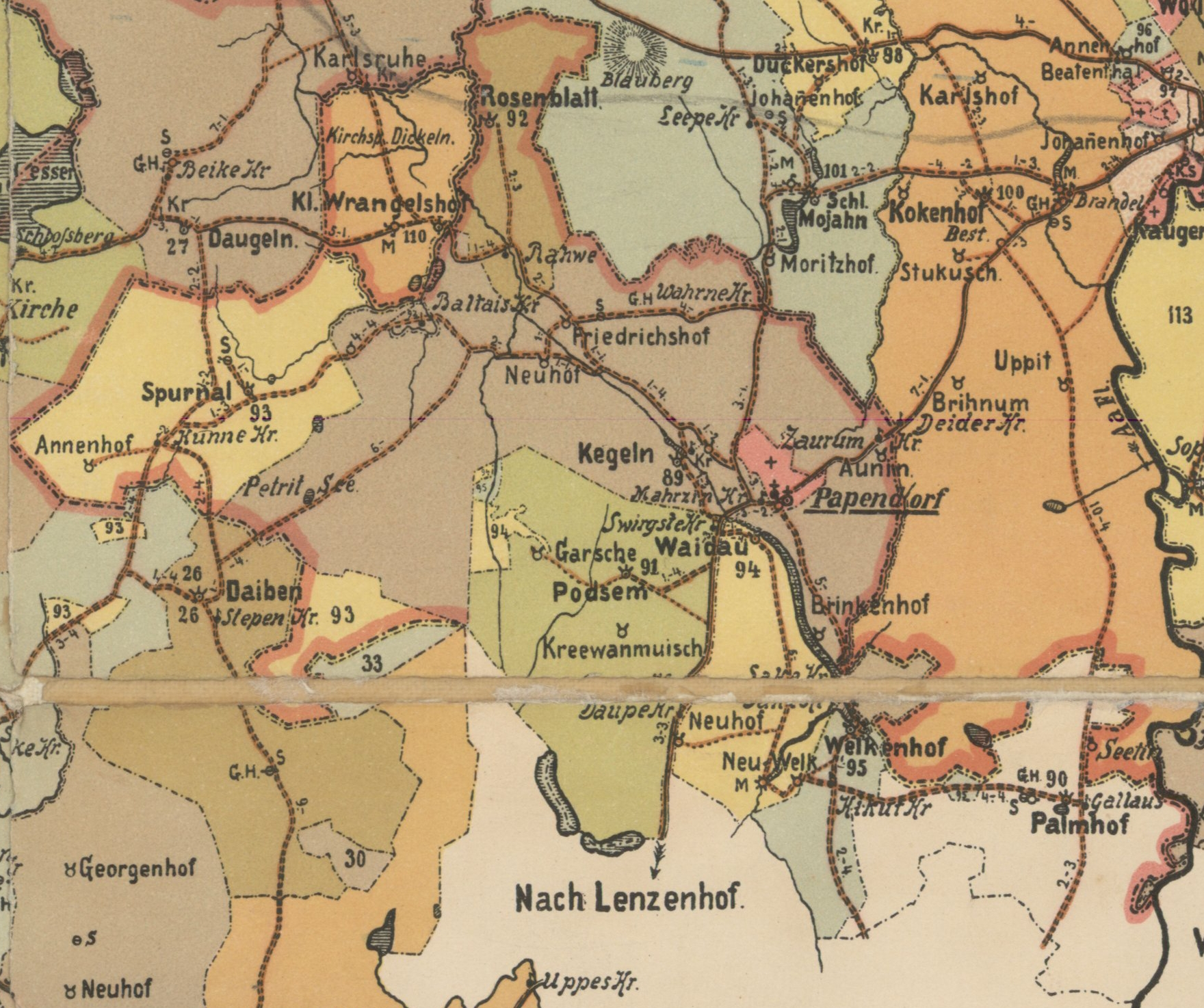 Rubene kihelkonna mõisad 1903. aastal.